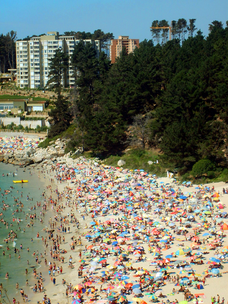 Playas "El Canelo" y "El Canelillo". Comuna de Algarrobo, Provincia de San Antonio, Chile.